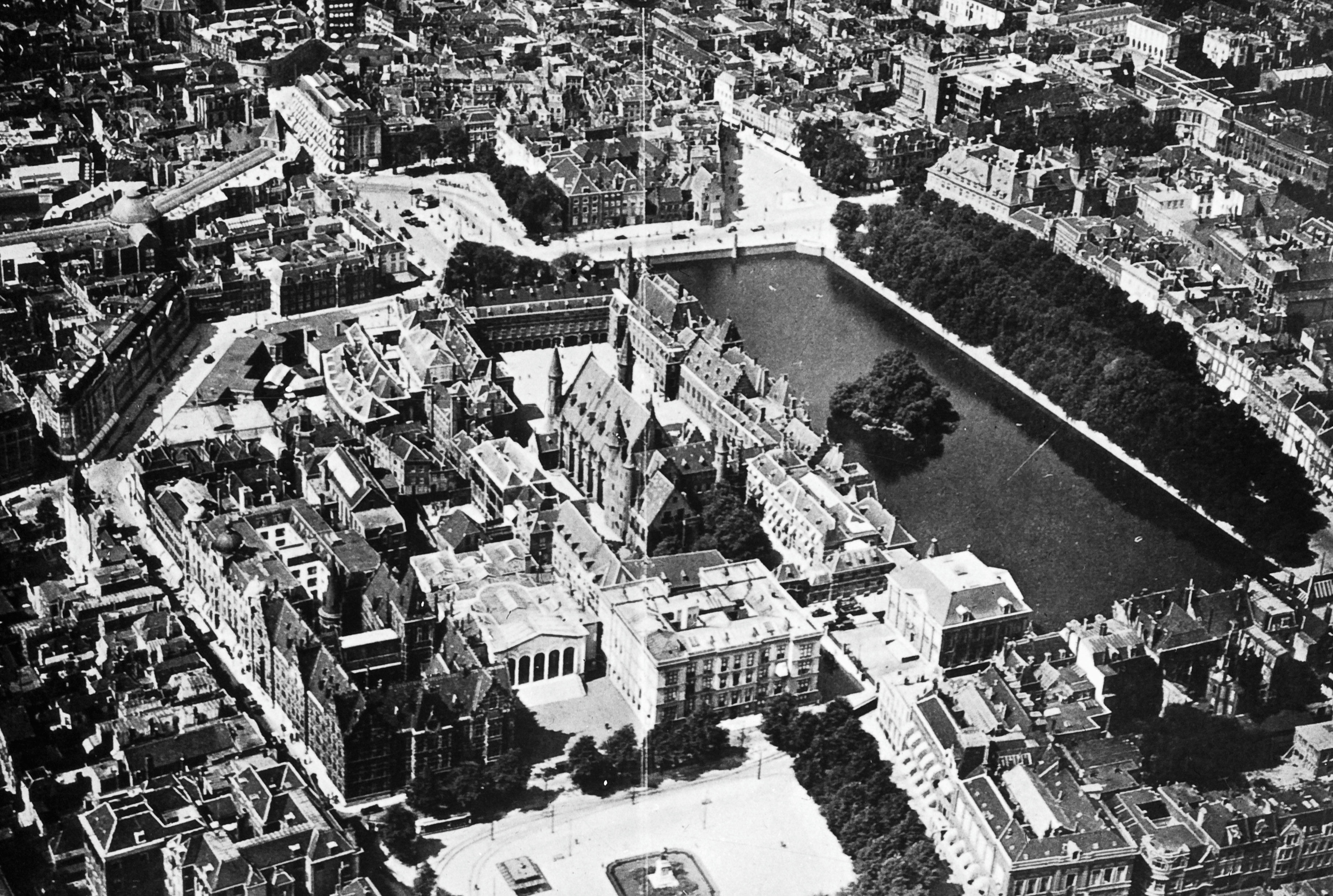 Binnenhof: Overzicht van het Binnenhof vanuit de lucht This is a possible Rijksmonument: Find the monument in the Monuments database: in 's-Gravenhage All Rijksmonumenten in 's-Gravenhage Is this a Rijksmonument? Yes No More information about this project and help. More images to work at in Category:Possible Rijksmonumenten.